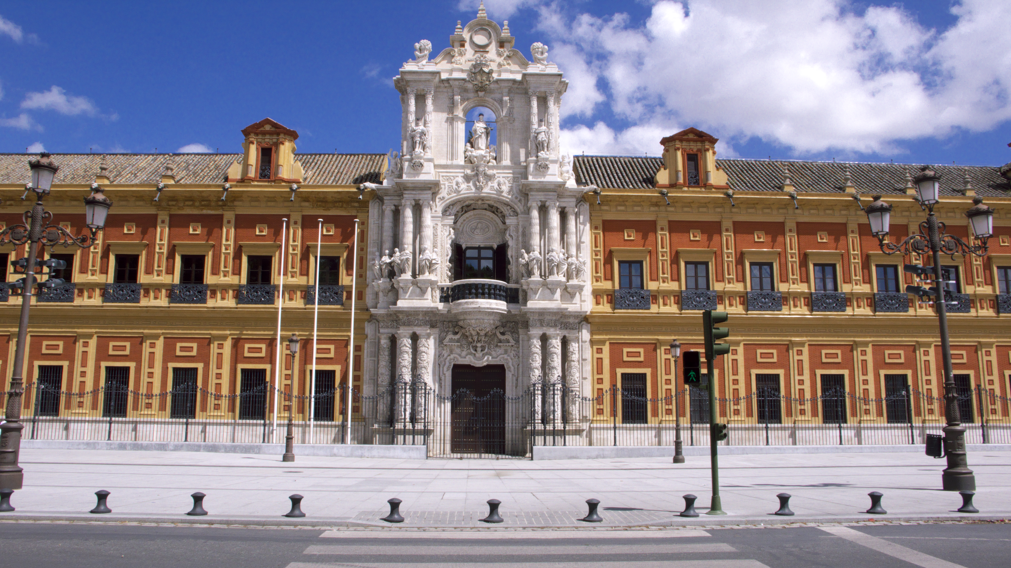 Sede del Excelentísimo Señor Presidente de la Junta de Andalucía.